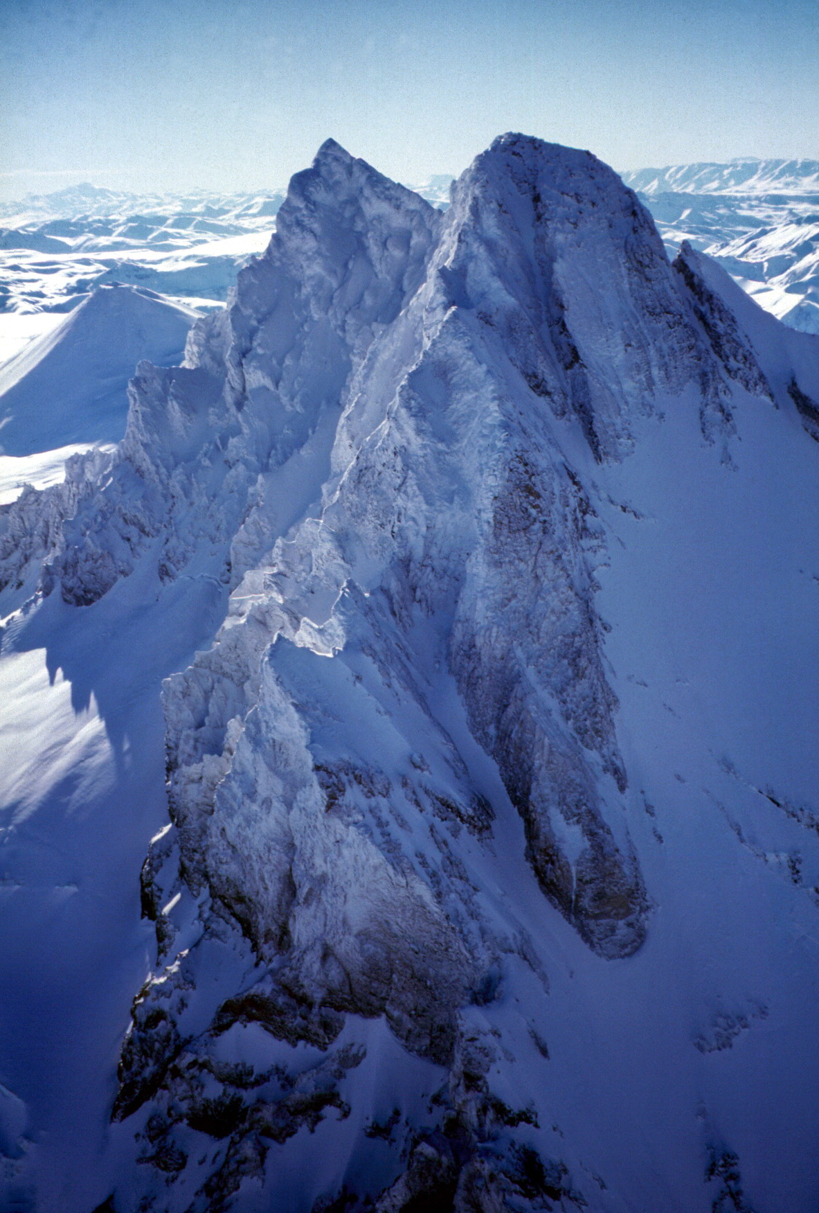 Sierra Velluda, Chile.